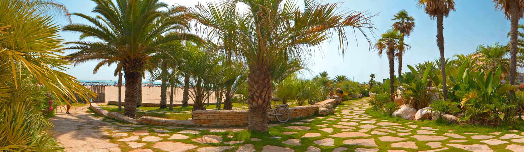 Una delle tante "oasi" che caratterizzano il nuovo arredo del lungomare sud di San Benedetto del Tronto